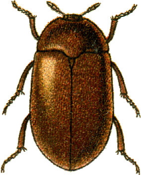 This file has been extracted from another file: Jacobs25.jpg